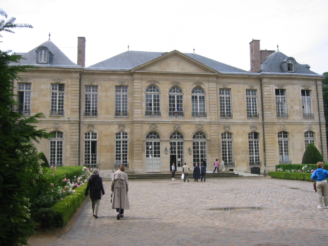 Hotel Biron - VIIe arrondissement de Paris - Musée Rodin